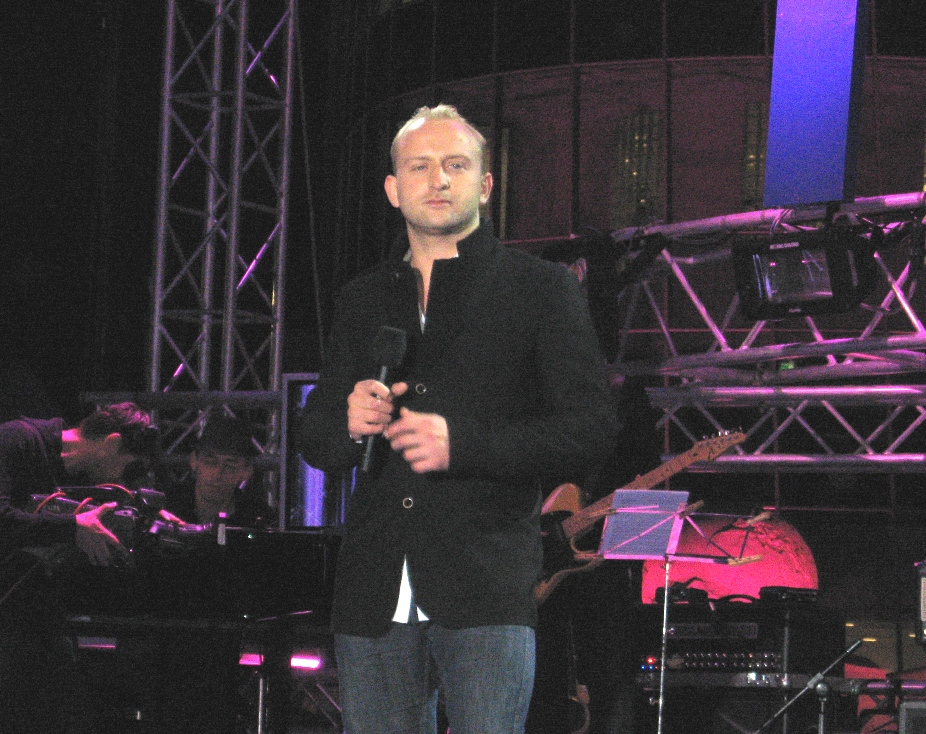 Koncert inaugurujący jesienną ramówkę TVP (Warszawa, ul. Woronicza): Borys Szyc